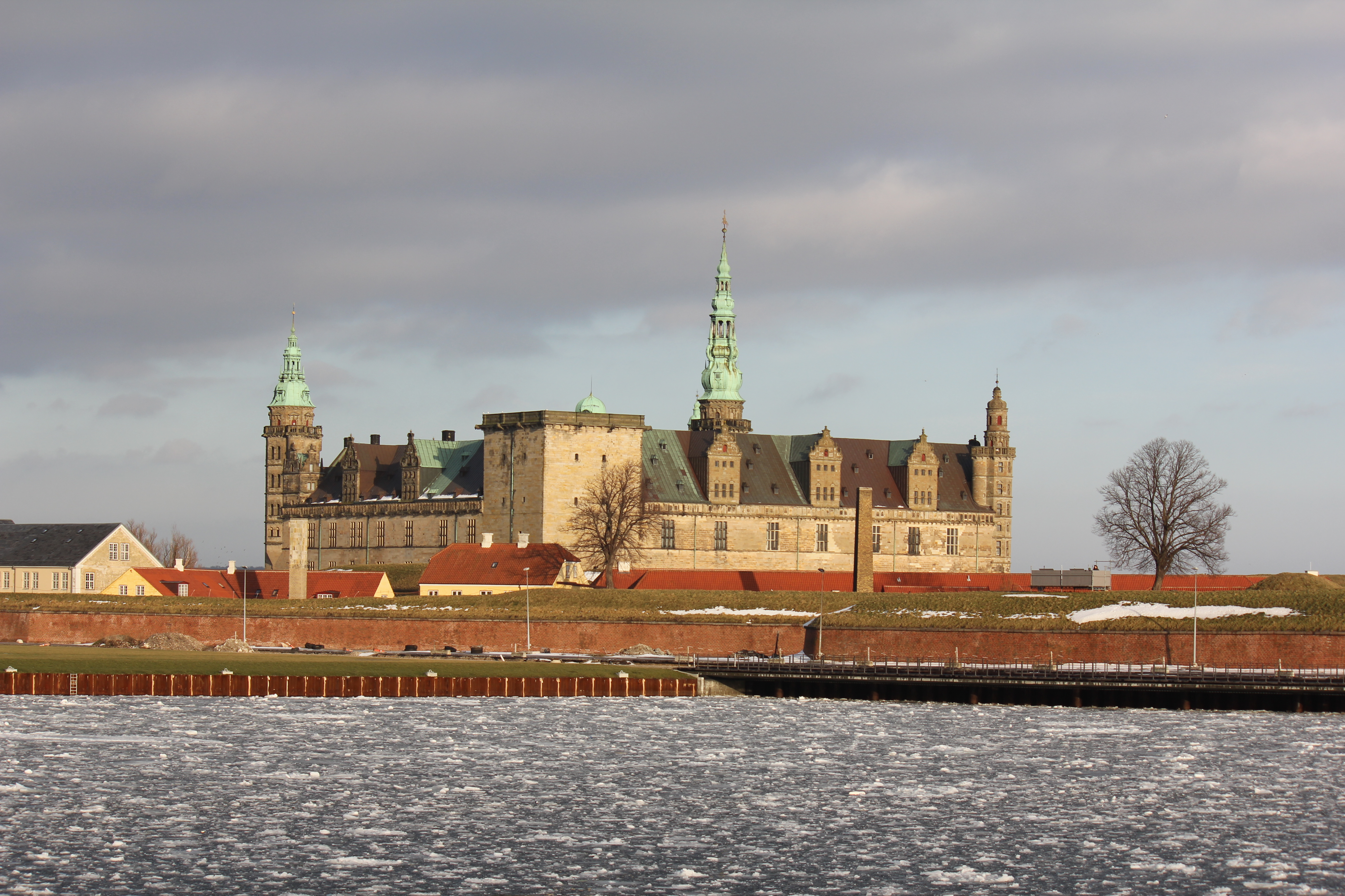 Kronborg Slot fra Helsingør Havn